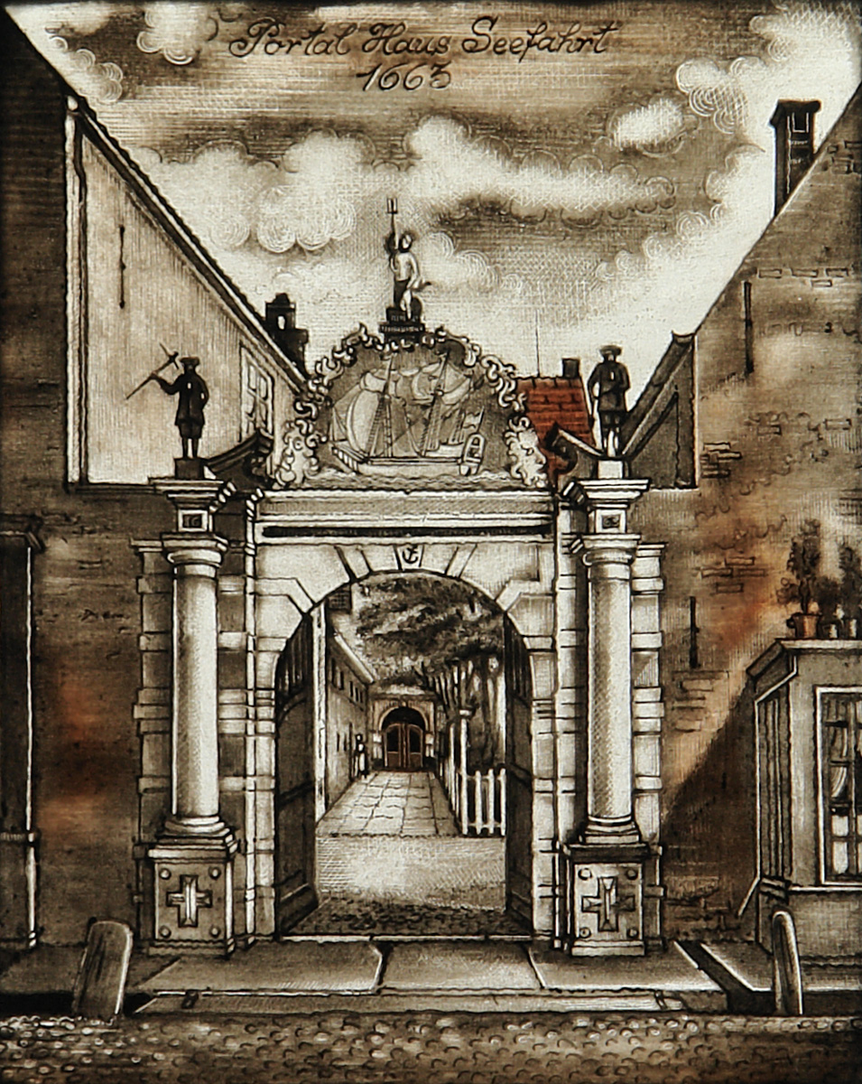 Baumwollbörse in Bremen. Glasbild: Portal Haus Seefahrt 1663